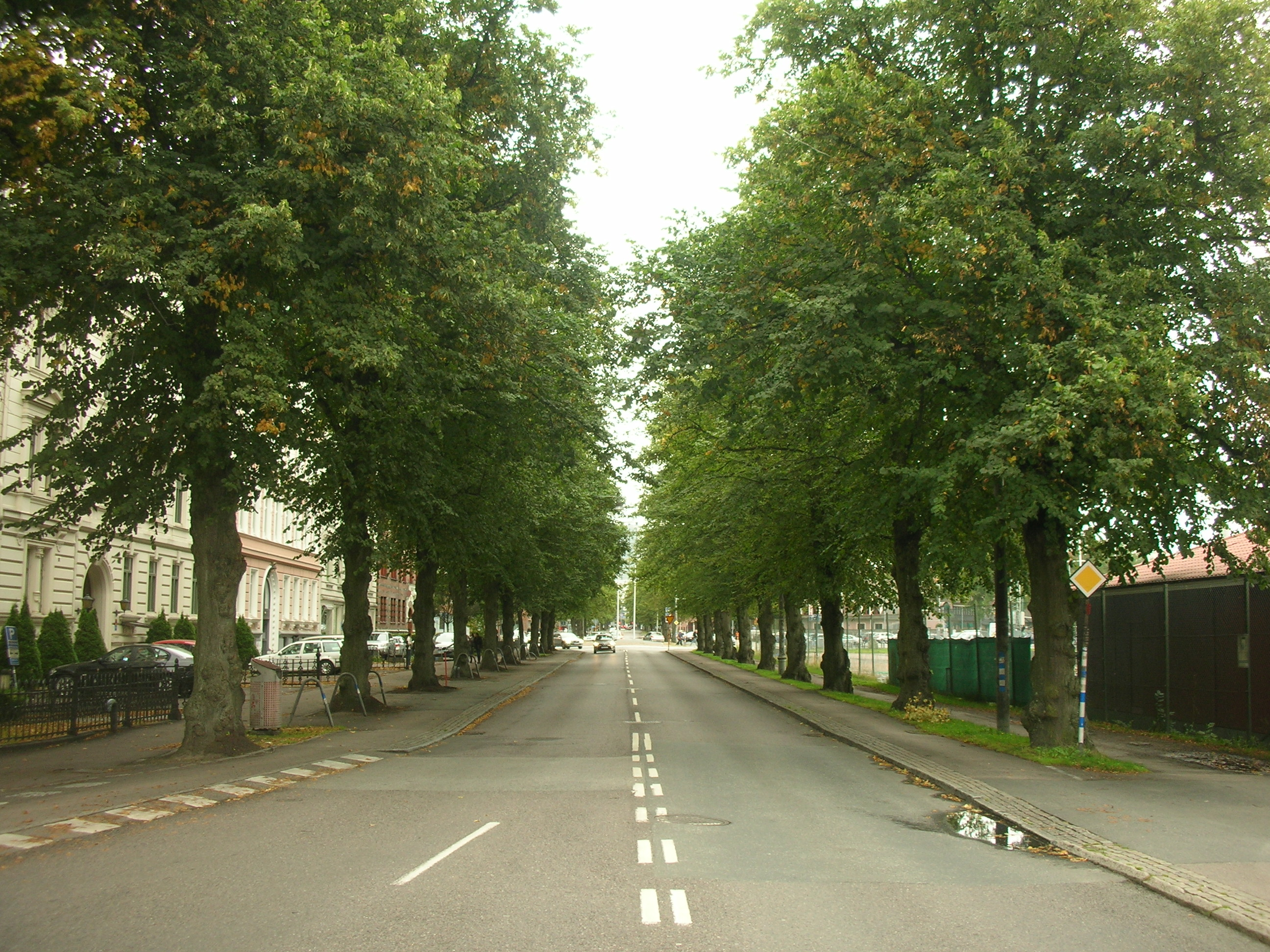 Sten Sturegatan (1), Göteborg, sedd från korsningen Parkgatan i riktning söderut mot korsvägen. September 2015.